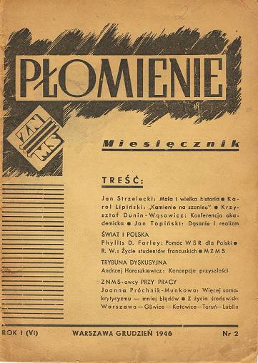 Pierwsza strona pisma ZNMS "Płomienie" z 1946 r.